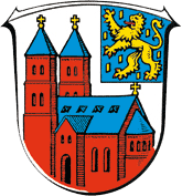 Wappen von Weilmünster